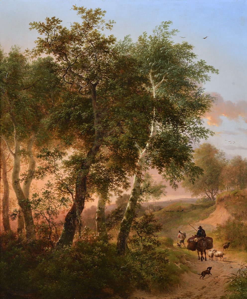 Typisch voor Hellemans zijn de pastorales. Mooi en duidelijk voorbeeld van het romantisch doch realistisch karakter in het afgebeelde landschap.